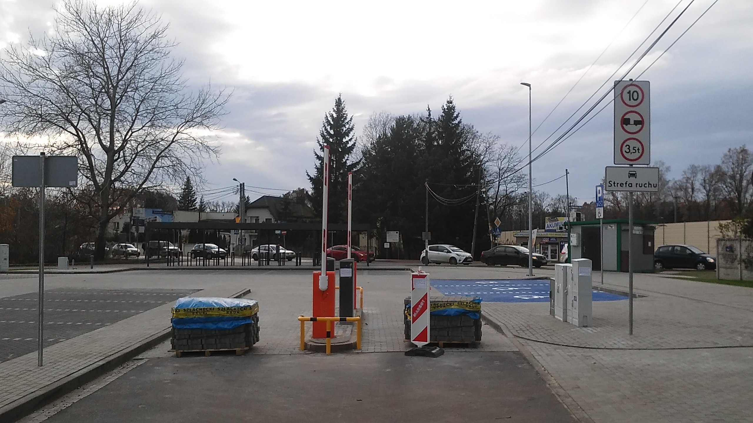 przystanek kolejowy Kobyłka Ossów - parking P+R w budowie, część A (ul. ks. J. Poniatowskiego), 50 miejsc postojowych